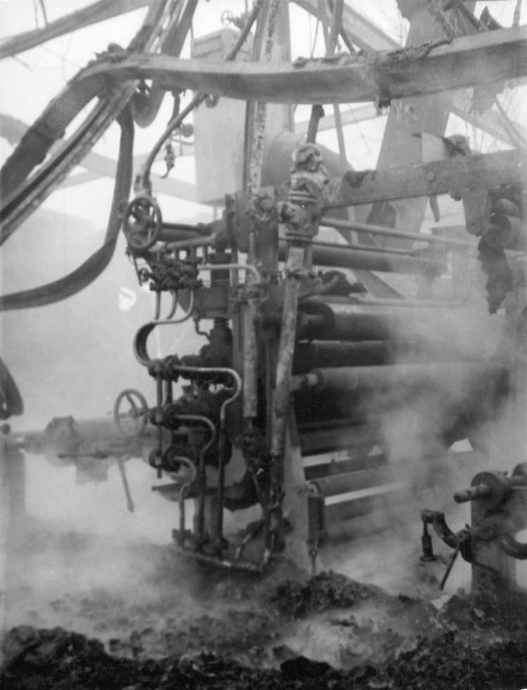 Från branden i Munters fabrik i Ulvsunda.